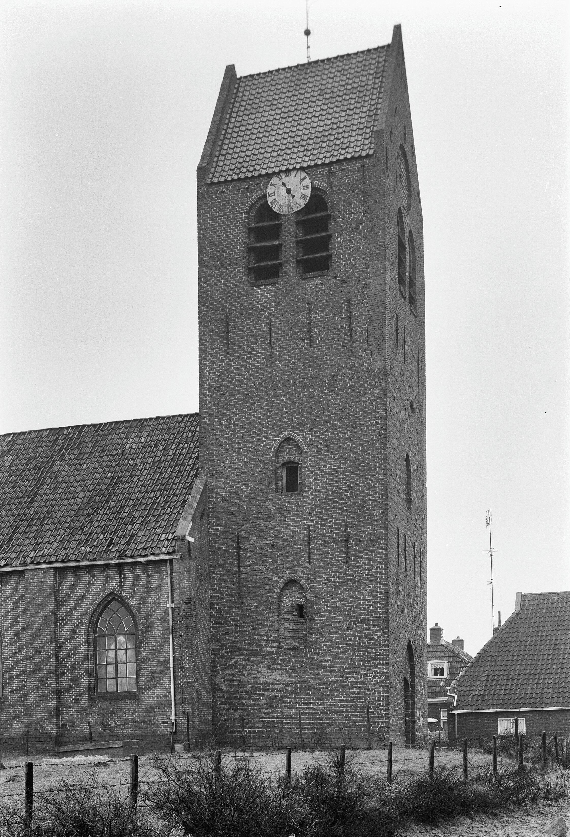 N.H.Kerk: toren noord-west zijde